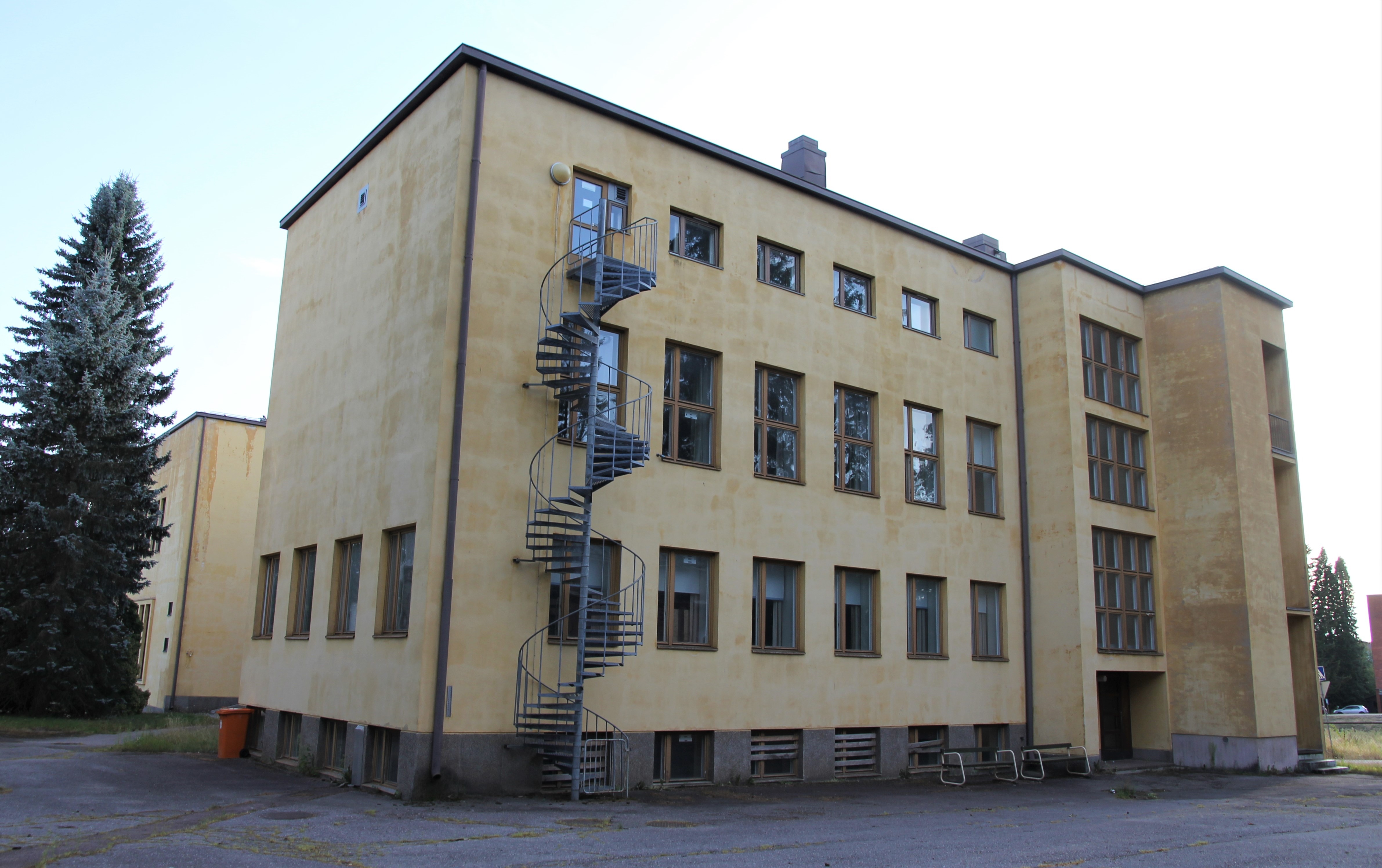 Heinolan seminaarin Uusi päärakennus (Toivo Salervo, Martti Välikangas, Väinö Vähäkallio ja Selim Savonius, 1939; laajennukset ja korotus 1952). Rakennus sijaitsee osoitteessa Lampikatu 5, joka on Heinolan Seminaarin kaupunginosaa.